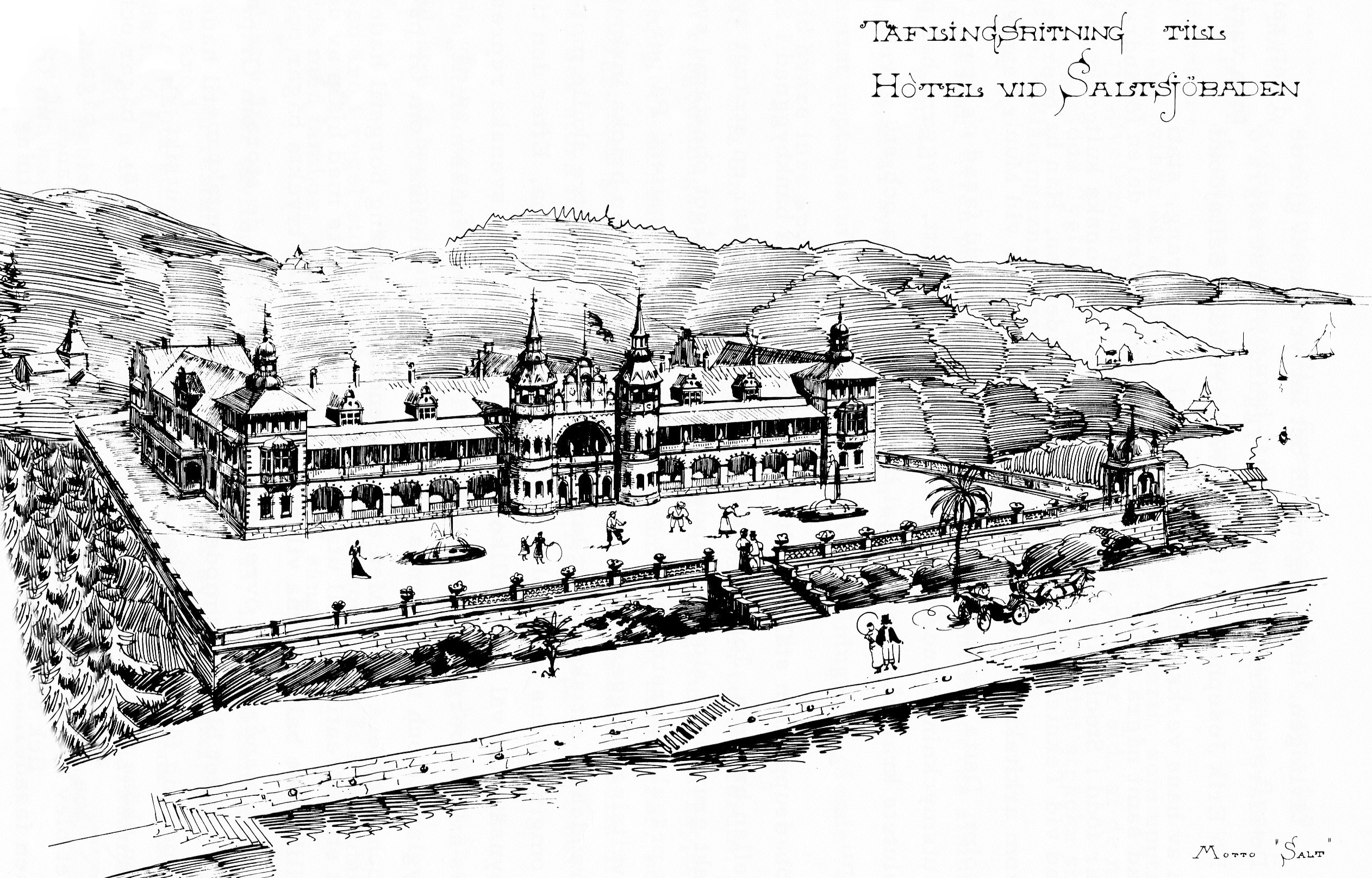 Grand Hotel, Saltsjöbaden, tävlingsbidrag "Salt", arkitekt Erik Josephson